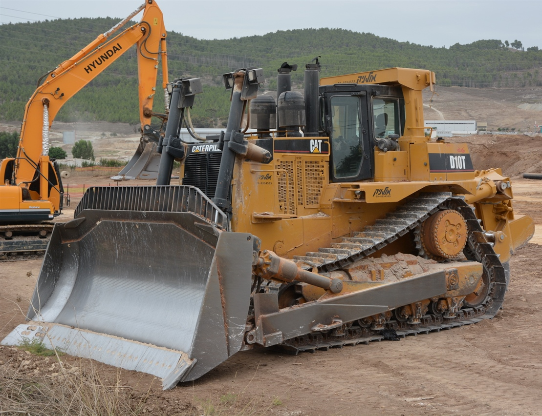 D10T קטרפילר של חברת אולניק.